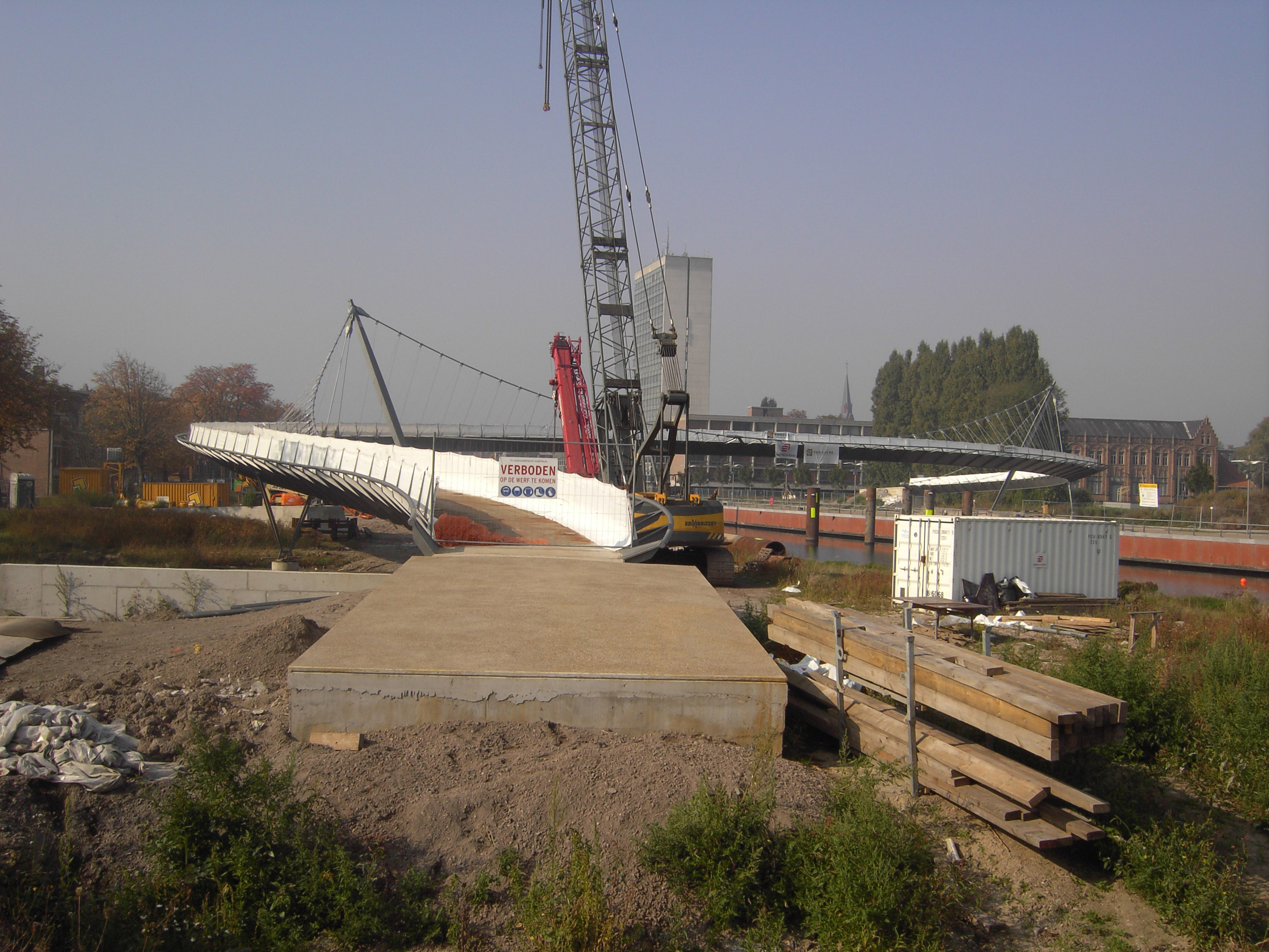 Kortrijk - voetgangers- en fietsersbrug over de Leie - West-Vlaanderen - België